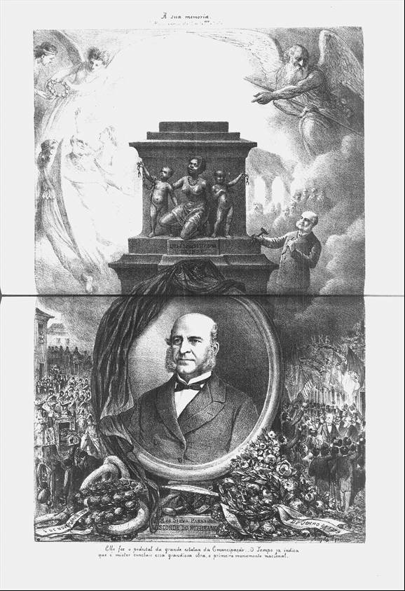 Revista Illustrada. Rio de Janeiro- [s.n], ano 5, n. 229(1), 1880. Acervo Afro-Brasileiro